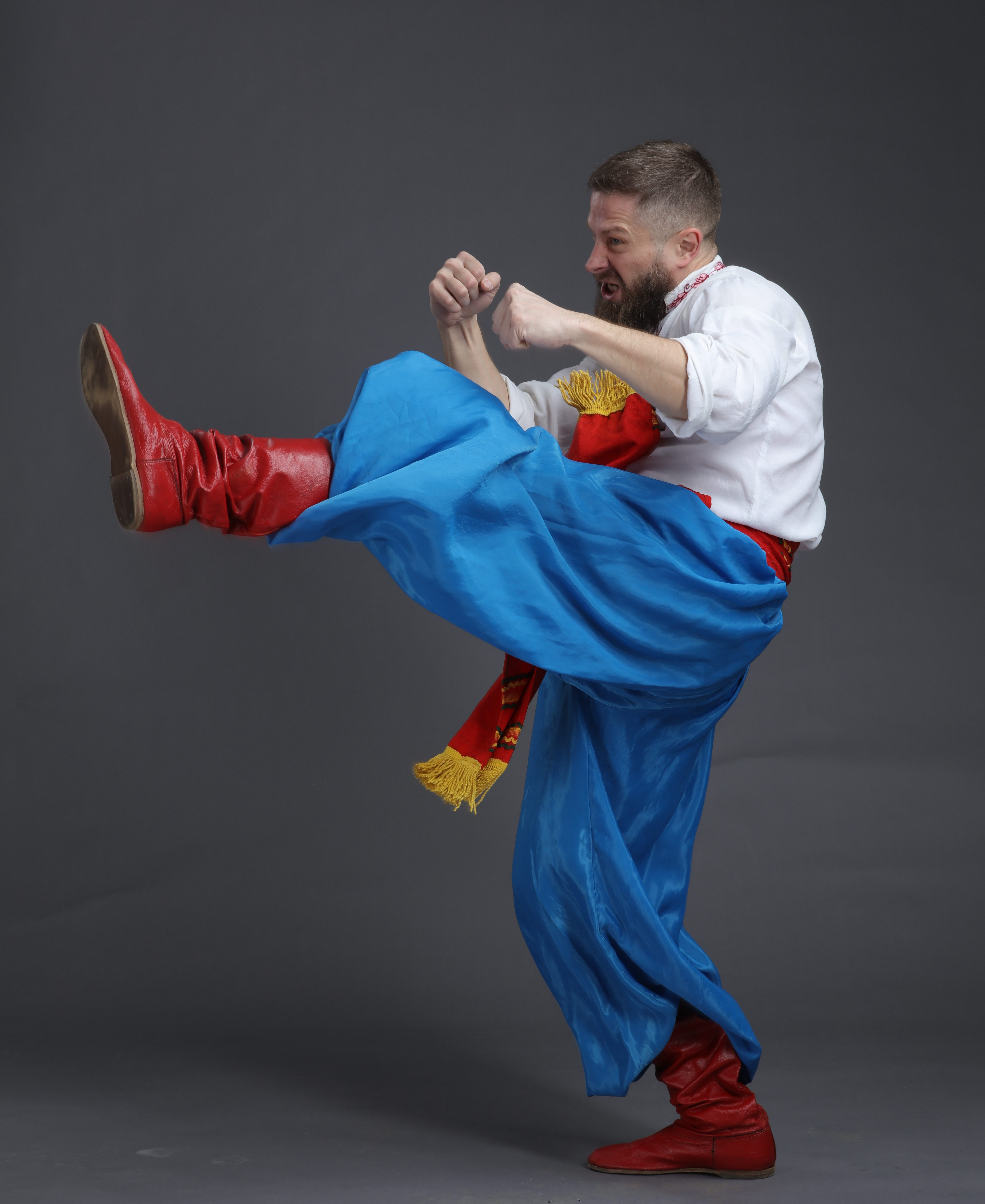 Oleksandr Chemykos performs Hopak